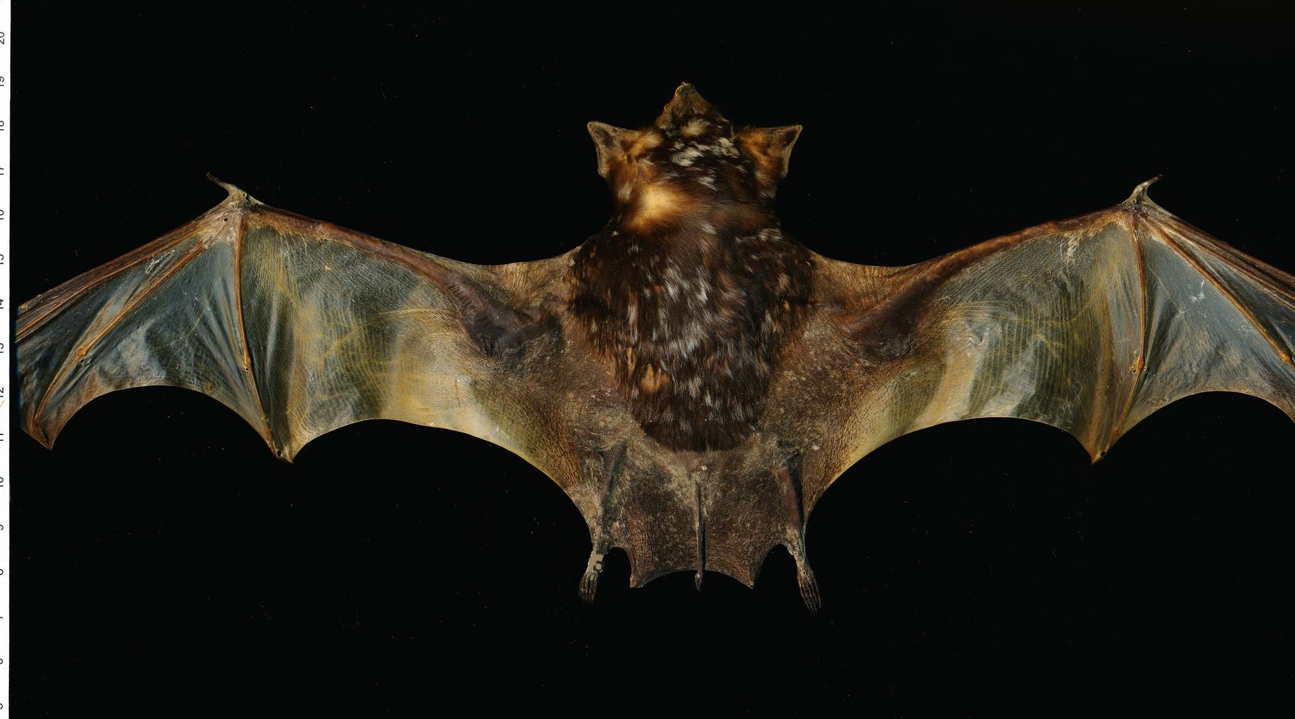 Saccolaimus saccolaimus, Temminck, 1838